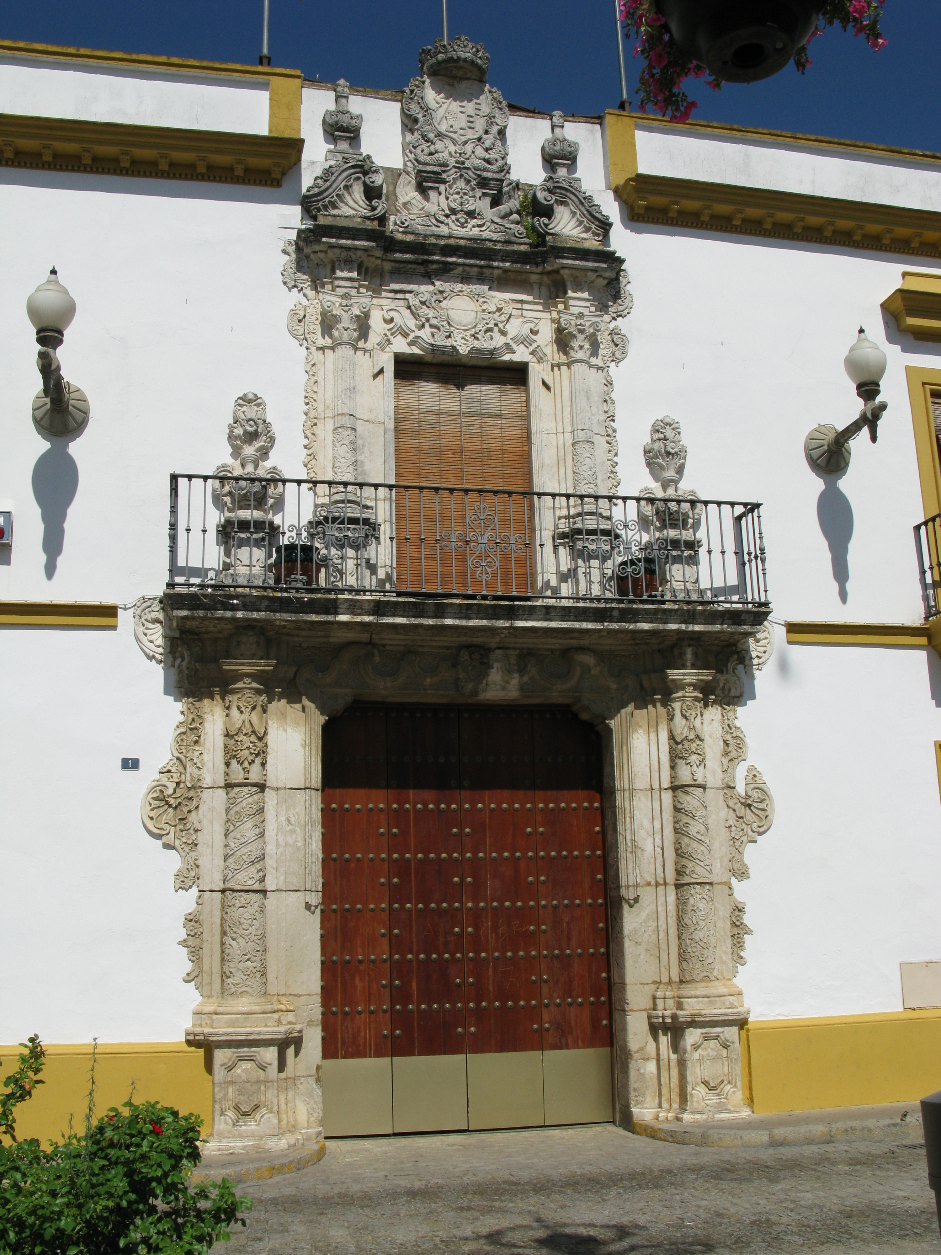 Portada del Ayuntamiento de Utrera (Sevilla, España). Antiguo palacio de Vistahermosa. Su portada rococó es de 1730. En su interior podemos destacar sus salones románticos e historicistas.